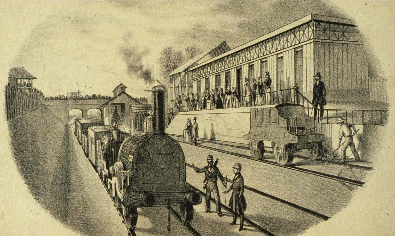 Le débarcadère de Koenigshoffen origine à Strasbourg du chemin de fer de Strasbourg à Bâle est mis en service en 1841.